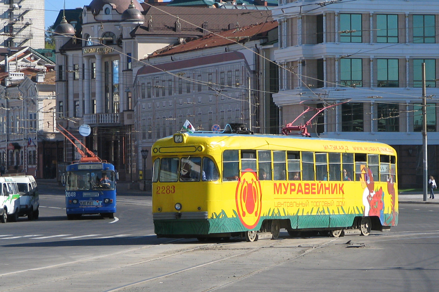 Электротранспорт Казани. Трамвай РВЗ-6 и троллейбус ЗиУ-9 (оба — 2-го маршрута) на Площ. Тукая